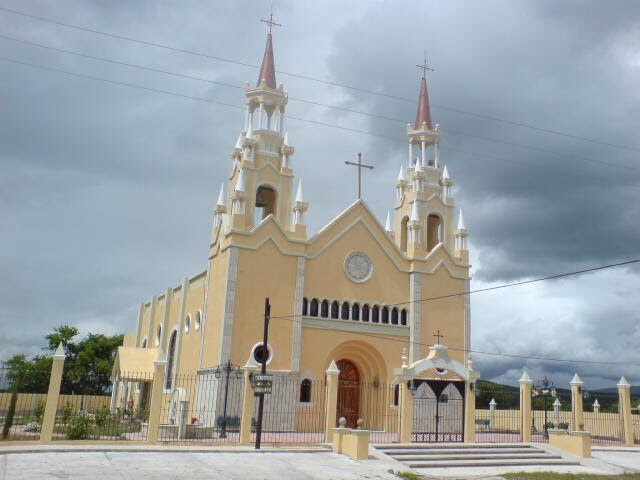 Templo De La Vurgen De la Soledad, La Soledad, Ecuandureo, Michoacan